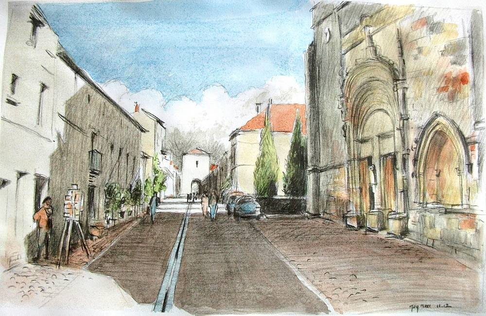 croquis au crayon, aquarellé, d'après photo perso / pencil sketch, watercoloured, after a photo